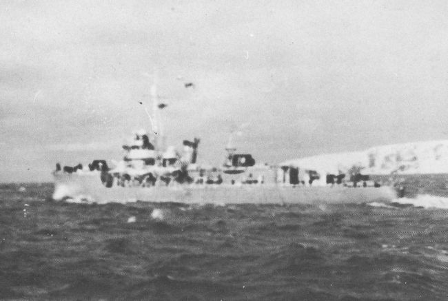 日本海軍 占守型海防艦「国後」、熱田島旭湾